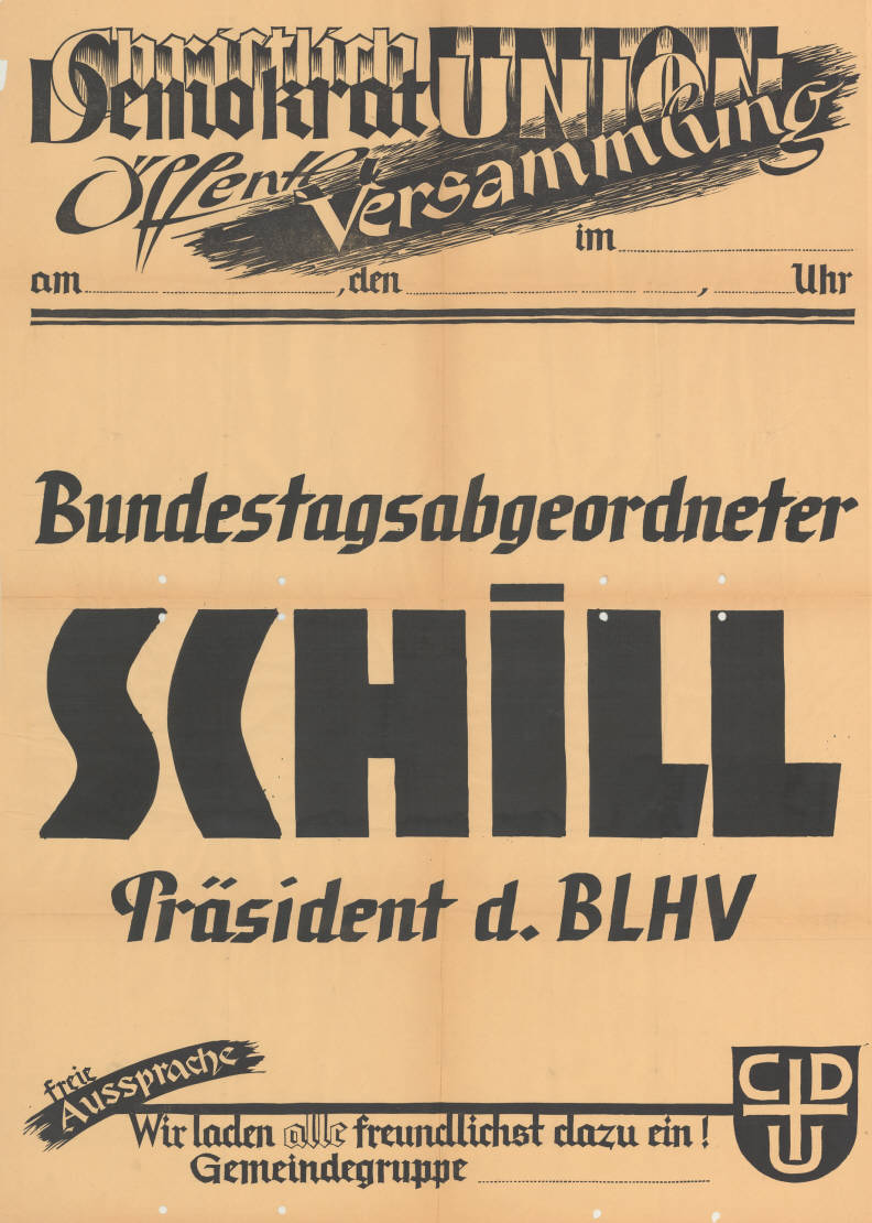 Christlich Demokrat Union Öffentl. Versammlung am ... Bundestagsabgeordneter Schill Präsident d. BLHV freie Aussprache Wir laden alle freundlichst dazu ein! Gemeindegruppe CDU Plakatart: Blanko-/Ankündigungsplakat Objekt-Signatur: 10-031 : 5014 Bestand: CDU-Plakate (10-031) GliederungBestand10-18: CDU-Plakate (10-031) » Ankündigungsplakate » Veranstaltungstermin nicht bestimmbar bzw. zweifelhaft Lizenz: KAS/ACDP 10-031 : 5014 CC-BY-SA 3.0 DE